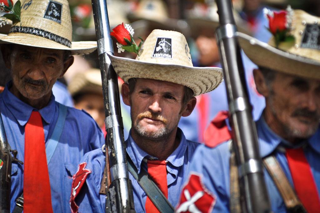 Bacamarte é uma arma de fogo, de cano curto e largo, também conhecida comogranadeira, reiuna, reuna ou riuna, principalmente, no Nordeste brasileiro. As granadeiras ou bacamartes que serviram na Guerra do Paraguai, em 1865, foram modificadas para que as armas se adaptassem ao uso dos bacamarteiros nas festas do interior de Pernambuco. Desde os fins do século XIX, grupos de bacamarteiros se exibem em Caruaru durante as festas juninas. Bacamarteiros: De um modo geral, o folguedo se constitui de homens portando bacamarte, que são disparados com cargas de pólvora seca, em homenagem aos santos padroeiros ou em cerimônias cívicas e políticas. Em Caruaru, os bacamarteiros reúnem-se em grupos, troças ou batalhões, sob a chefia de um sargento e o controle geral de um comandante, que responde, perante às autoridades, pelos atiradores durante as apresentações. A forma como os bacamarteiros se agrupam é bastante primitiva. Não há formalidades ou regulamentos. Só é necessário possuir um bacamarte, obedecer ao sargento e saber manejar a arma. A sanfona de 8 baixos, o triângulo, o zabumba de couro curtido e a banda de pífanos, acompanham os bacamarteiros de Caruaru, ao som de uma melodia de xaxado, que é acelerada nos desfiles ou lenta nas evoluções, na apresentação das armas, na frente das Igrejas e antes do início das salvas. O vestuário compõe-se de roupa de zuarte (algodão azul), lenço no pescoço, chapéu de couro, alpargatas e cartucheiras de flandre. Os bacamarteiros oriundos dos brejos, usam chapéus de abas largas, quebrado na frente, enfeitados com flores silvestres. Eles também colocam flores nos canos das armas. Os comandantes exibem estrelas nos ombros e nos chapéus e usam bengalas ou guarda-chuvas como símbolo de comando. Apesar de Caruaru ser o maior pólo de bacamarteiros no Estado, existem também grupos em outros municípios pernambucanos como Cabo, Limoeiro e Belo Jardim.